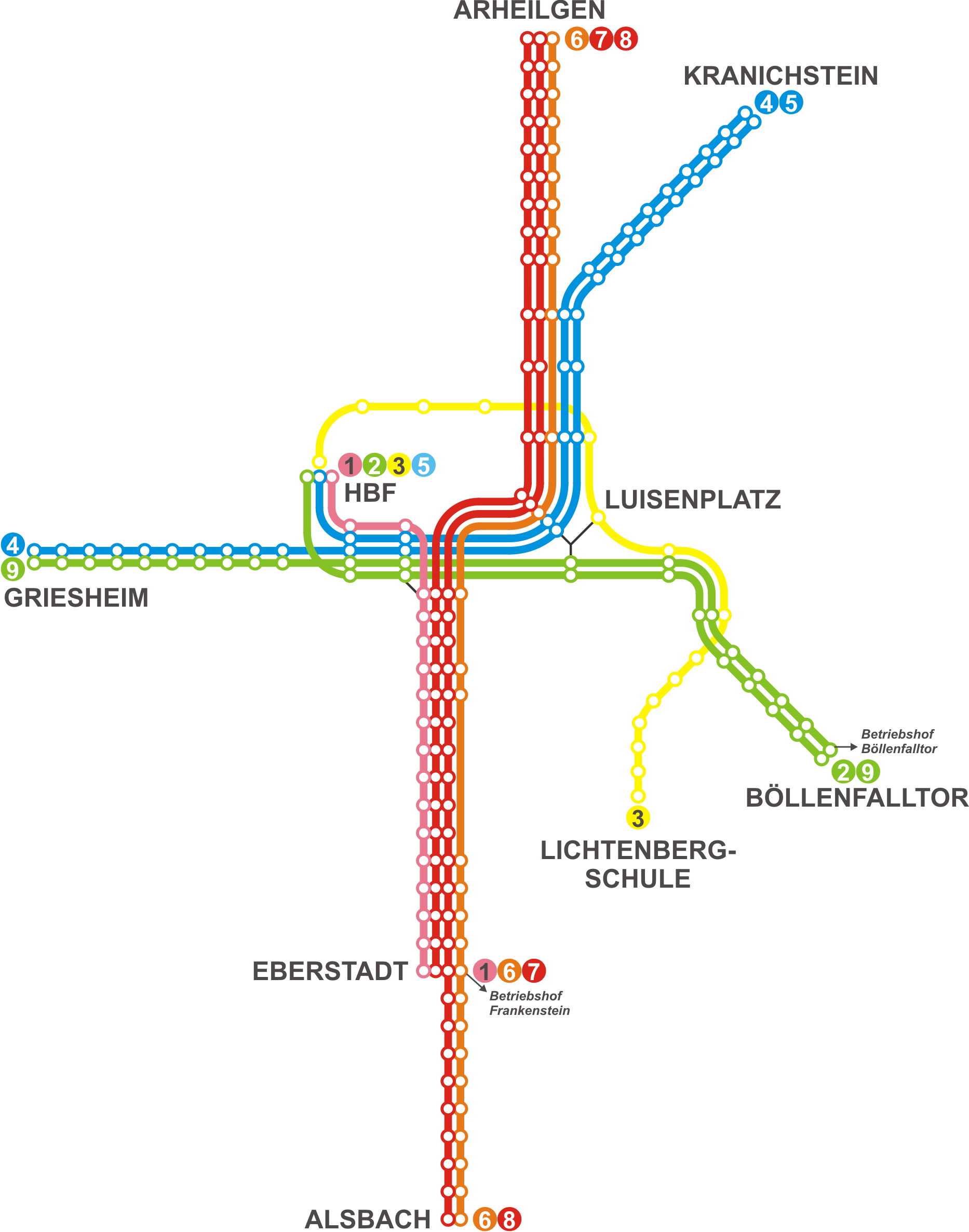 Liniennetzplan der Straßenbahn Darmstadt